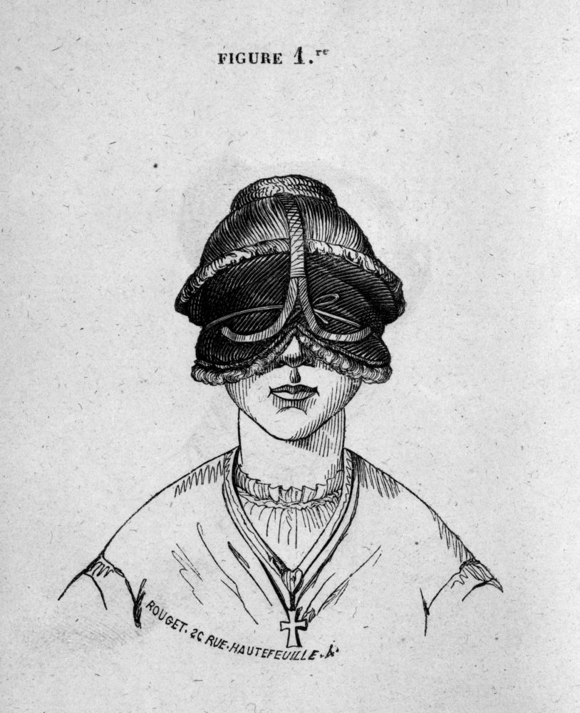 Jaune Sonâmbula